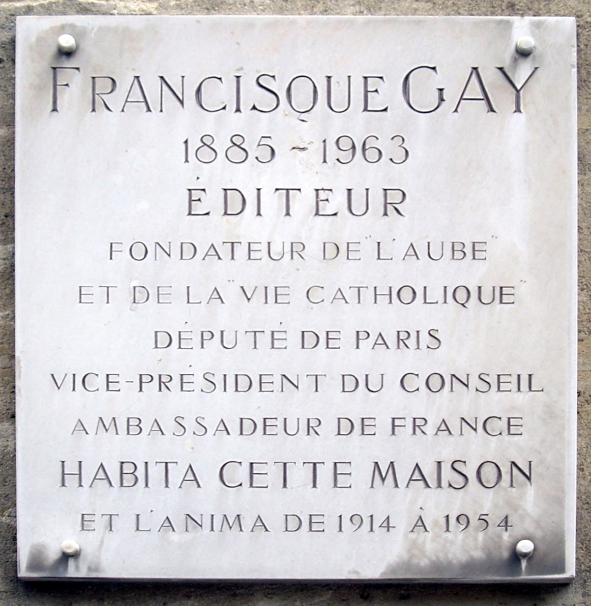 Plaque apposée au n° 3 de la rue Garancière, Paris 6e, siège de la maison d'éditon Bloud & Cie, devenue Bloud & Gay en 1911.« Francisque Gay, 1885-1963, éditeur, fondateur de L'Aube et de La Vie catholique, député de Paris, vice-président du Conseil, ambassadeur de France, habita cette maison et l'anima de 1914 à 1954. »